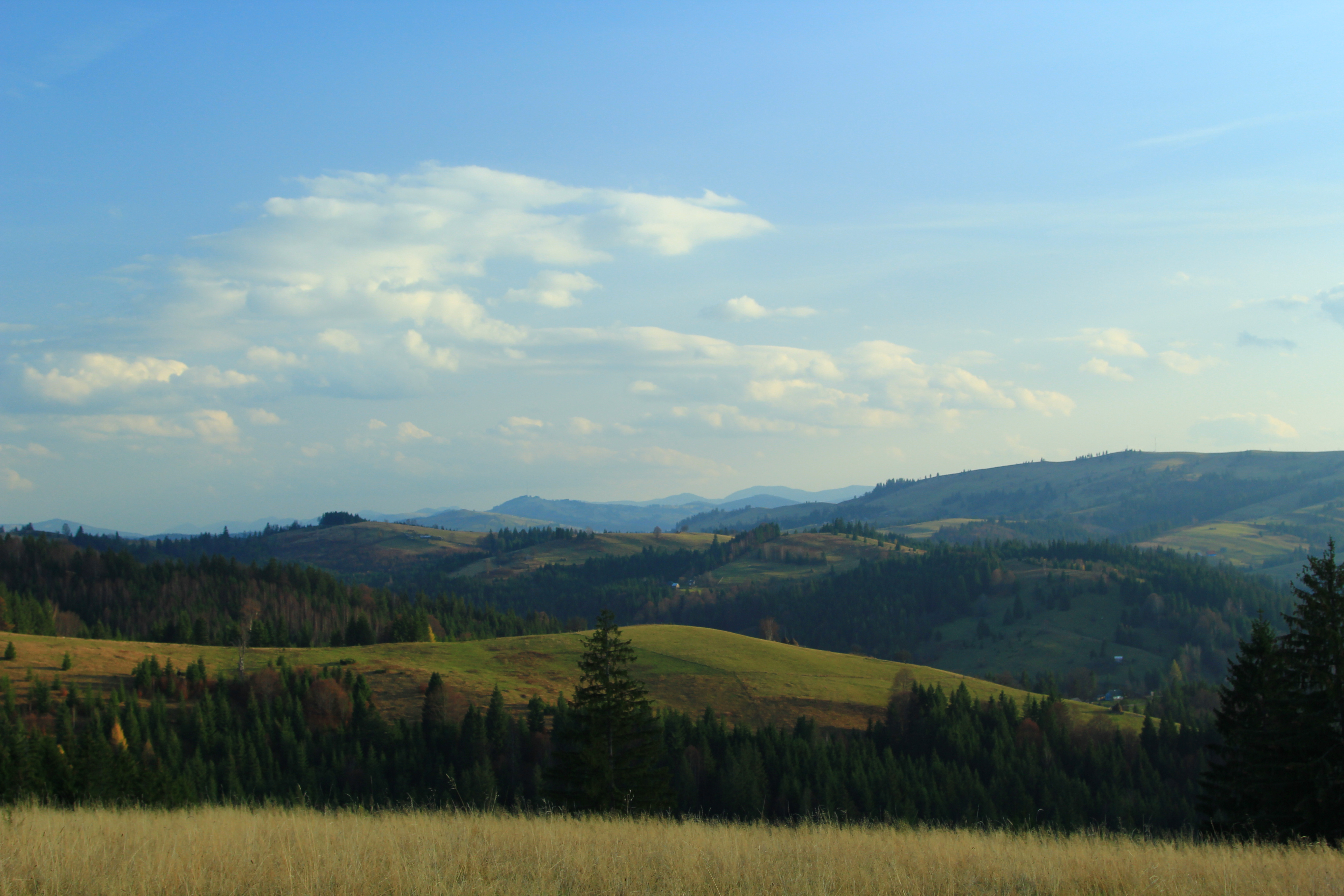 Черемоський, Путильський район